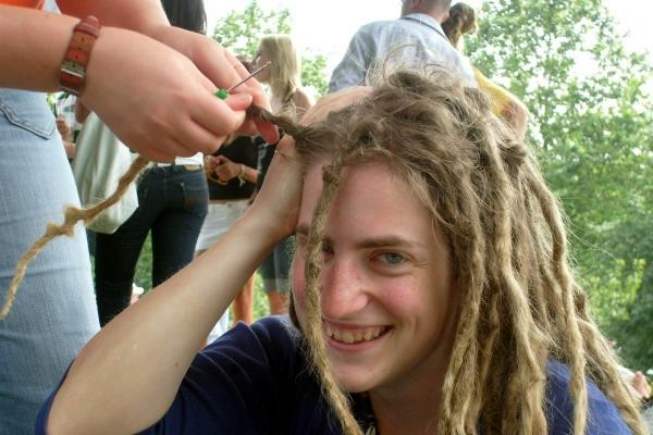 Dreadlocks häkeln